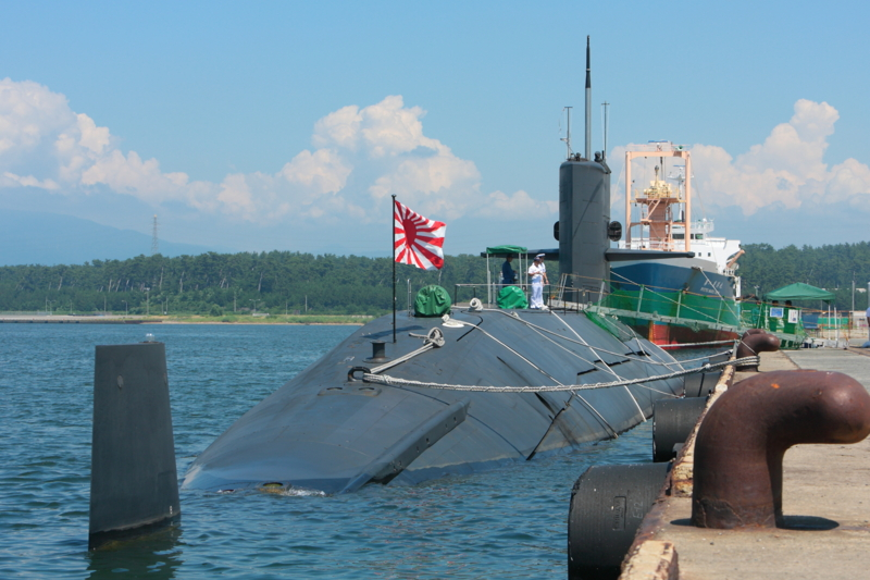 練習潜水艦あさしお。酒田港に繋留中。